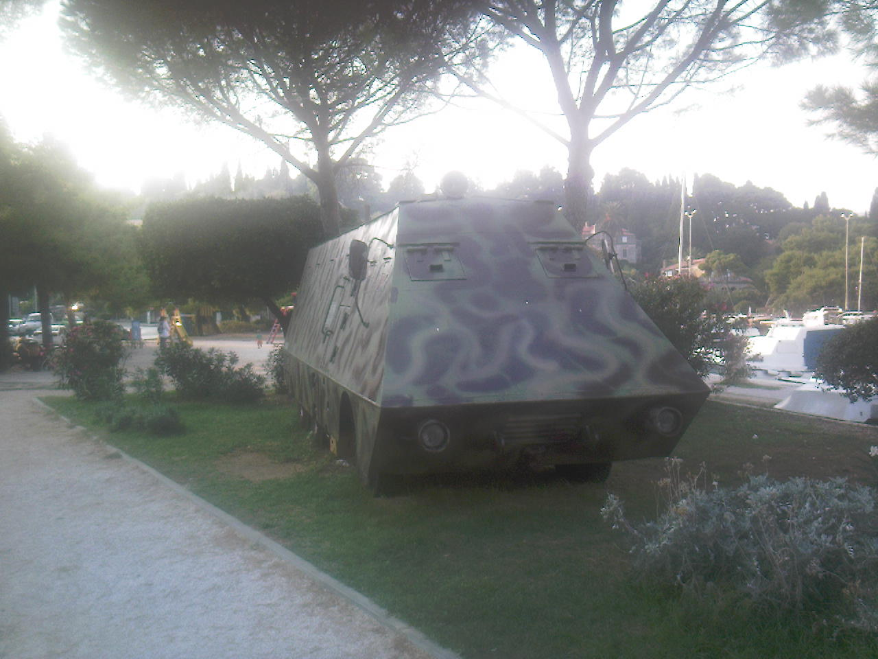 Improvizirani oklopnjak Majsan